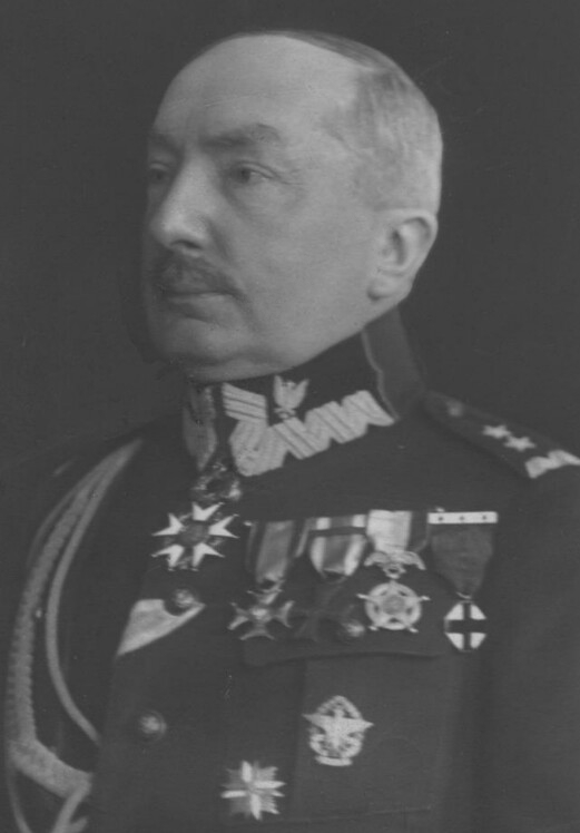 Kazimierz Raszewski